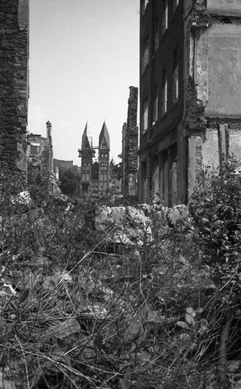 ca 1946/1947 Kriegszerstörungen in Koblenz (im Hintergrund die Castor-Kirche)